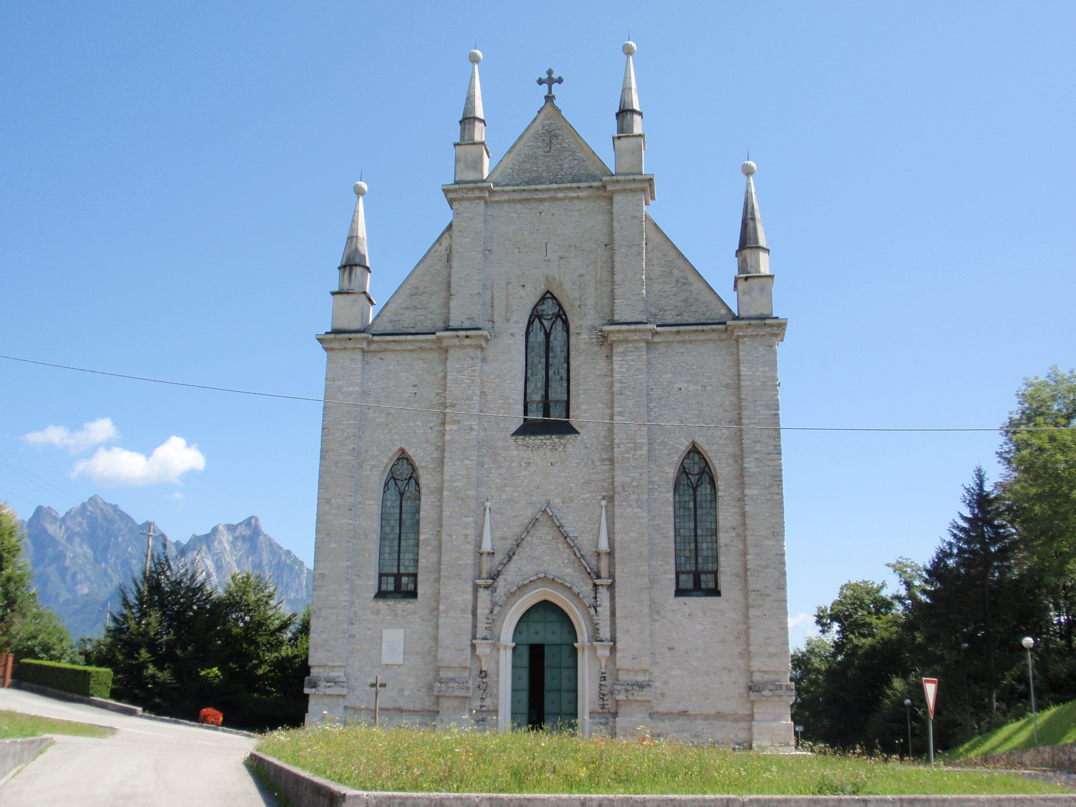 Eglise patronale des Saints Pierre et Paul à Sospirolo (Italie)